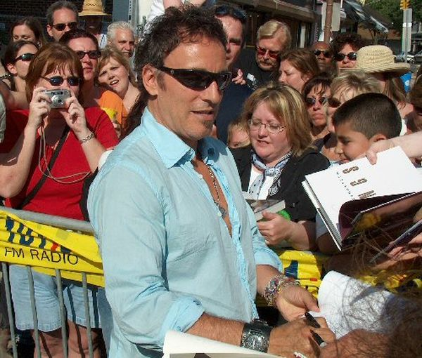 Bruce Springsteen and fans, New York